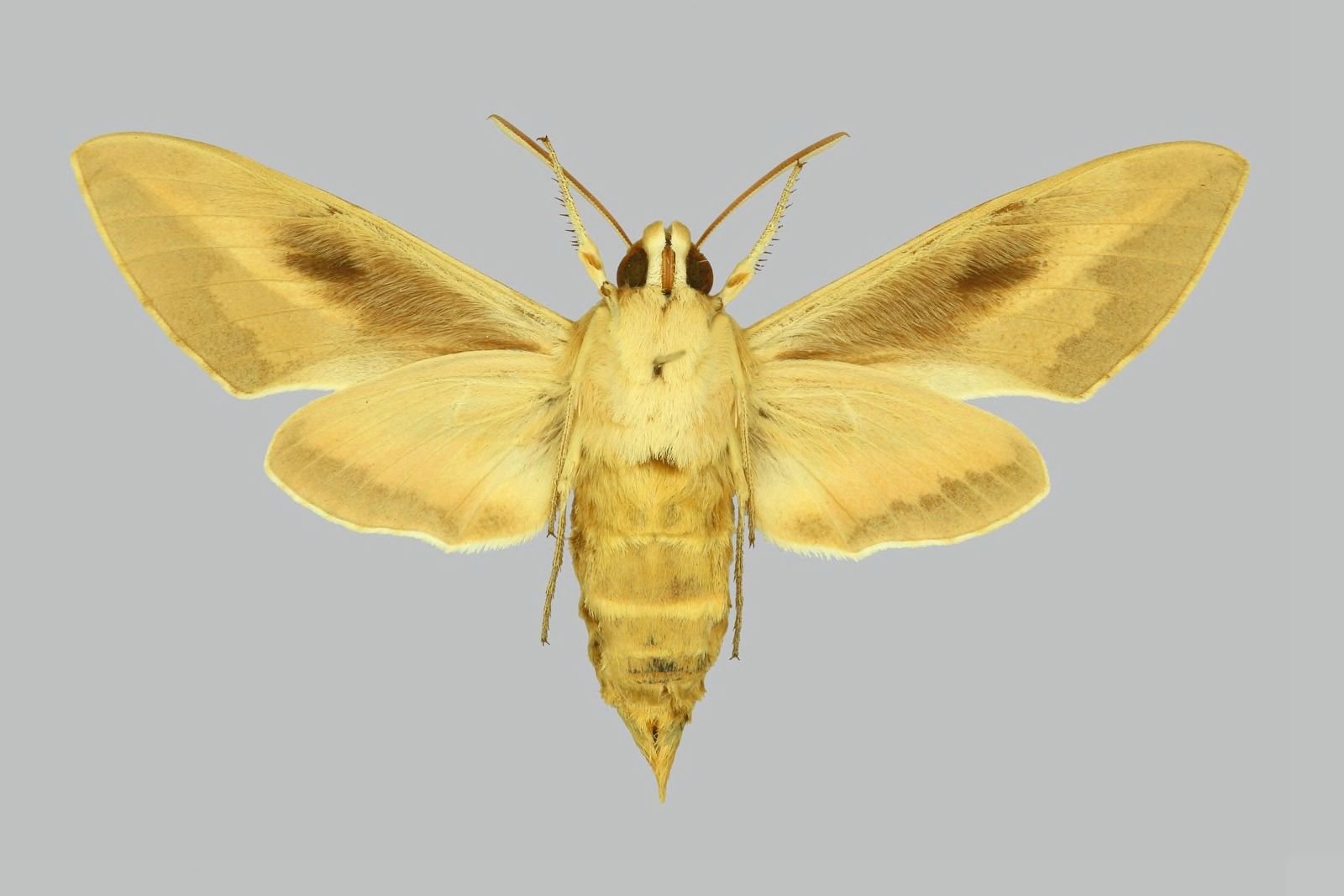 Hyles zygophylli, female, underside. Turkmenistan, Oase Tedschen, Fluss Herikud, westl. von Merv